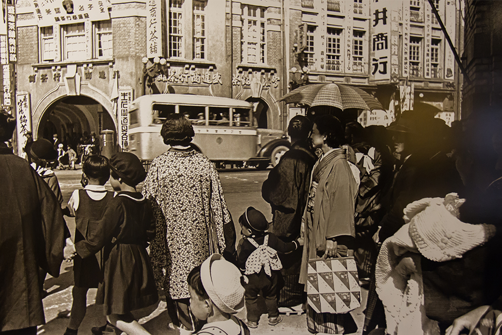 台灣著名攝影家李火增（1911-1975）前輩拍攝於日本時代1942年（日昭和17年）左右的作品：台北榮町街景。 榮町範圍大約是今日228紀念公園西側起，衡陽路、寶慶路、秀山街之全部及博愛路，在日本時代是台北市最熱鬧也最繁華的商店街，當時台灣最大的百貨公司「菊元百貨」也設立於此； 老照片拍攝的位置推測可能在今台北市博愛路與衡陽路附近（？），對面街屋可看到當時台北市著名商家之一「盛進商行茶鋪」店面。 延伸閱讀： 高石組本社（今撫臺街洋樓） 台北榮町